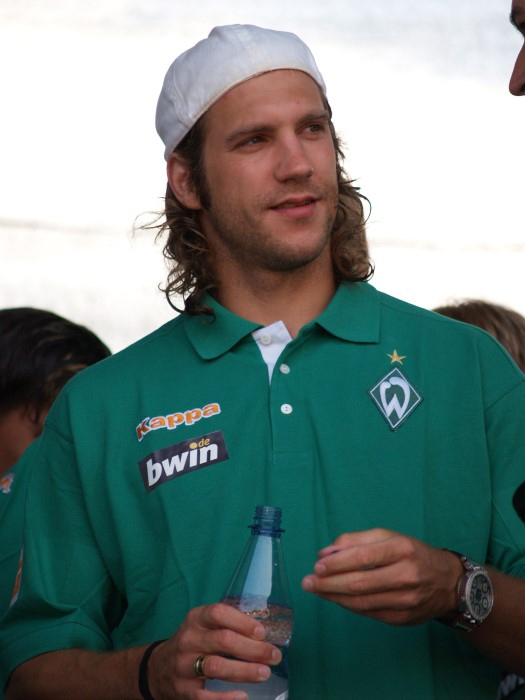 Torsten Frings beim Tag der Fans